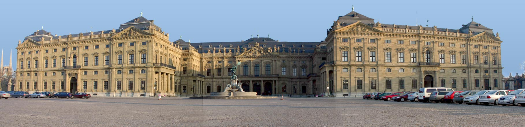 Fürstbischöfliche Residenz zu Würzburg, Frontansicht